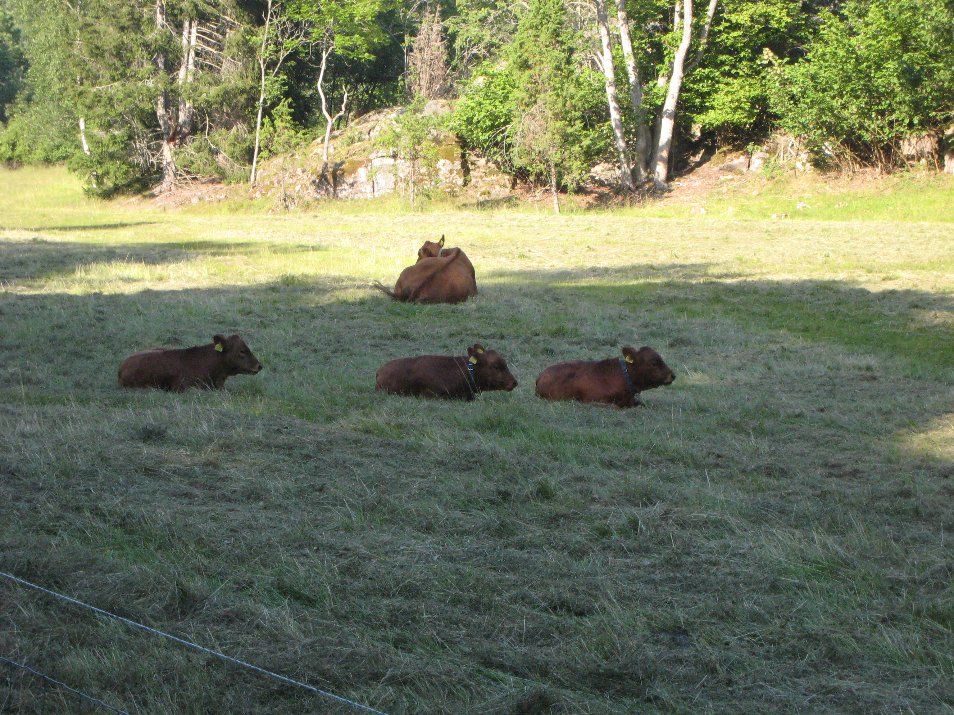 Rödkullor på Grinda i Stockholms skärgård.